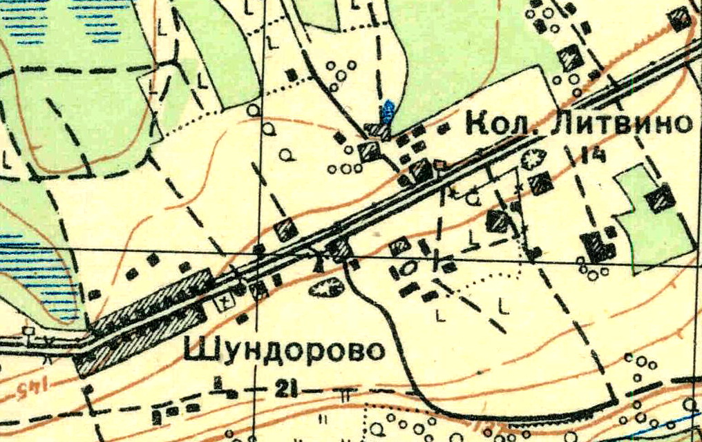 Топографическая карта Ленинградской области, квадрат О-35-24-А-а (Клясина), деревня Шундорово